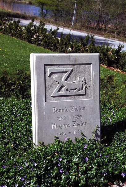 Vær Kirke i Danmark. Gravsten over Mogens Zieler (1905-1983) og hustru